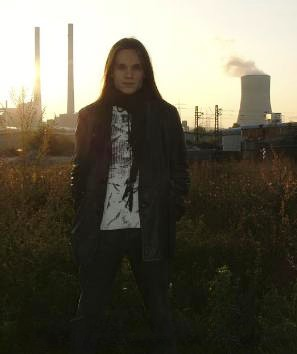 Mikko Harkin